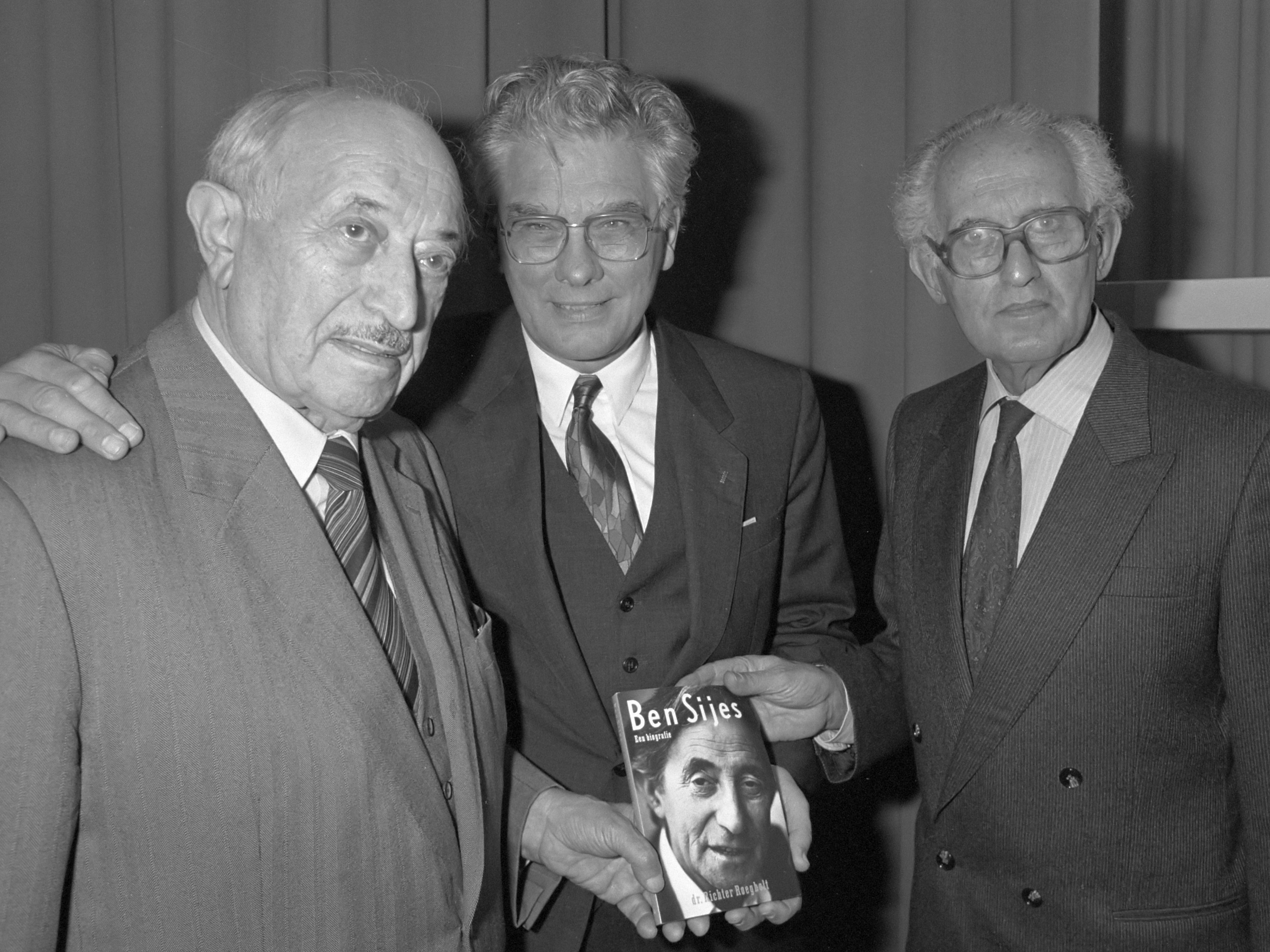 Presentatie boek over Ben Sijes ; v.l.n.r. Simon Wiesenthal, Richter Roegholt en Lou de Jong 19 oktober 1988